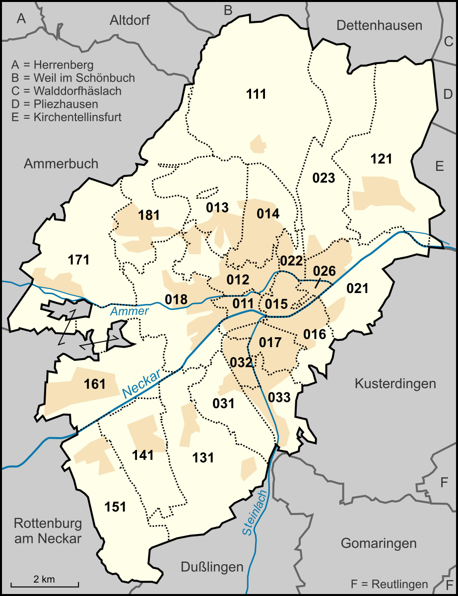 Karte der Stadtteile der Stadt Tübingen